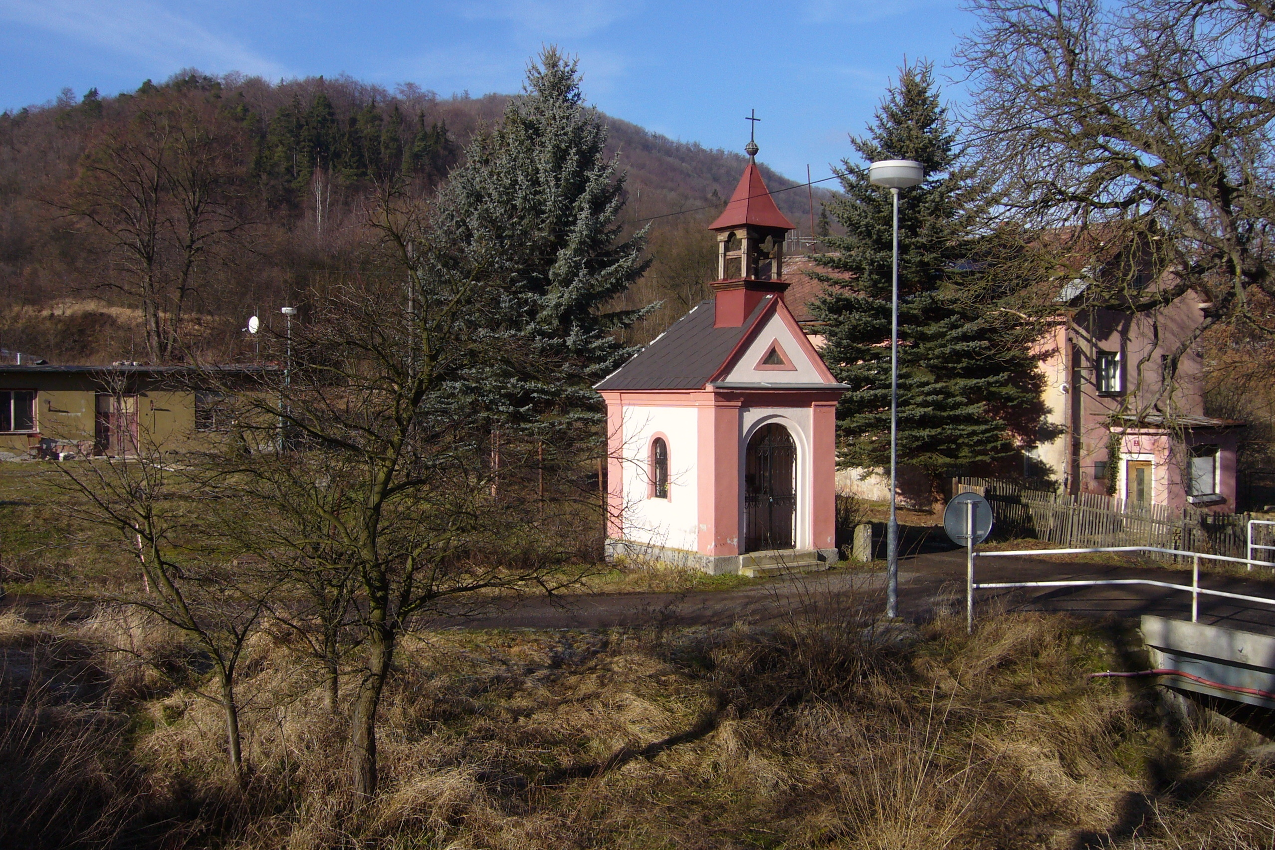 Brodce - Kaple Božího milosrdenství